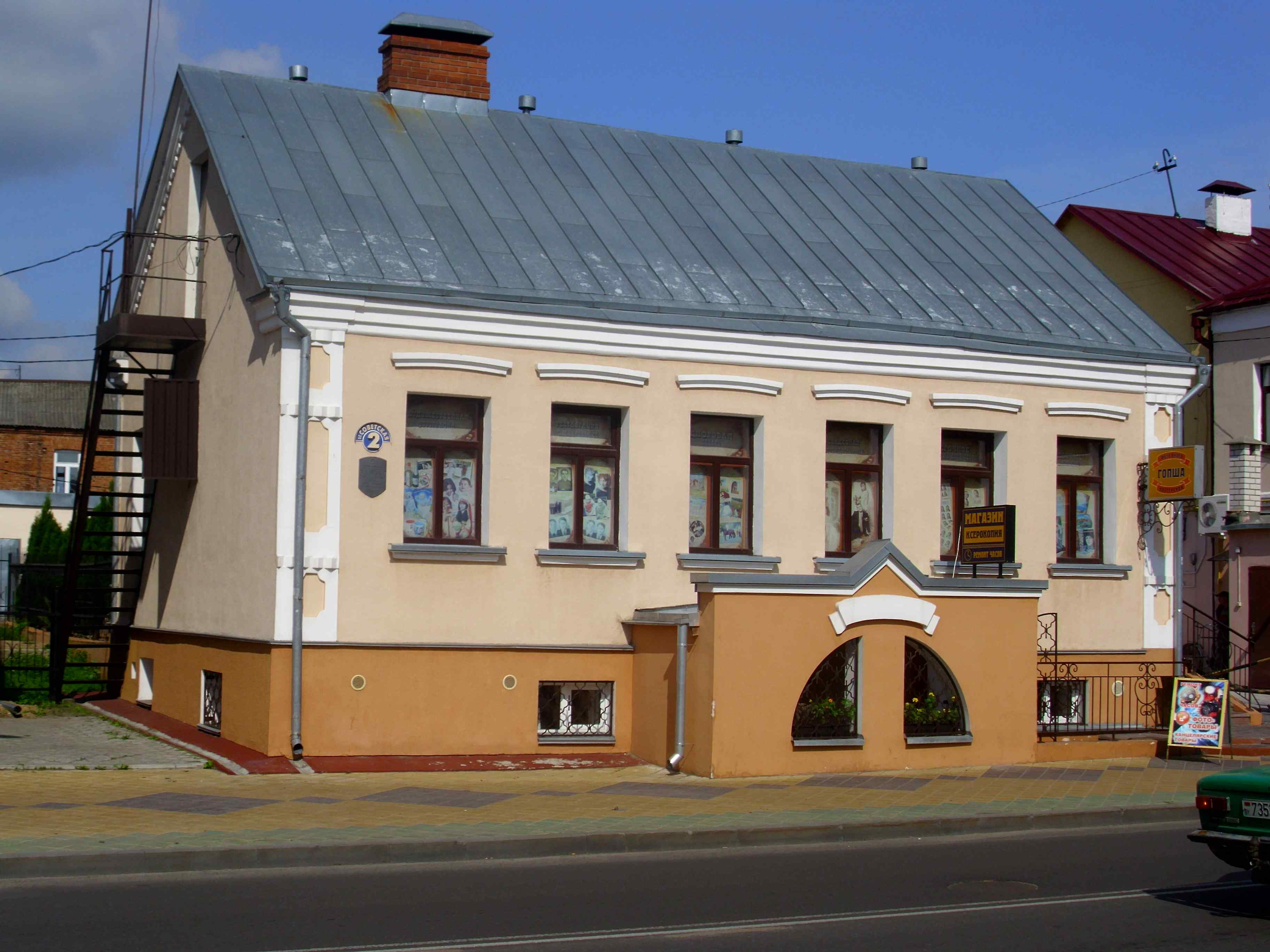 Ул. Советская, 2. Кобрин, Брестская область, Беларусь. This is a photo of Belarusian heritage monument. Reference number: 113Г000398 ( WLM)